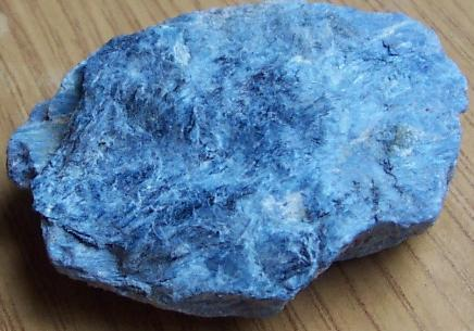 minerał; dumortieryt; pochodzenie Madagaskar, autor zdjęcia Sebastian Socha; 05.08.2006r.